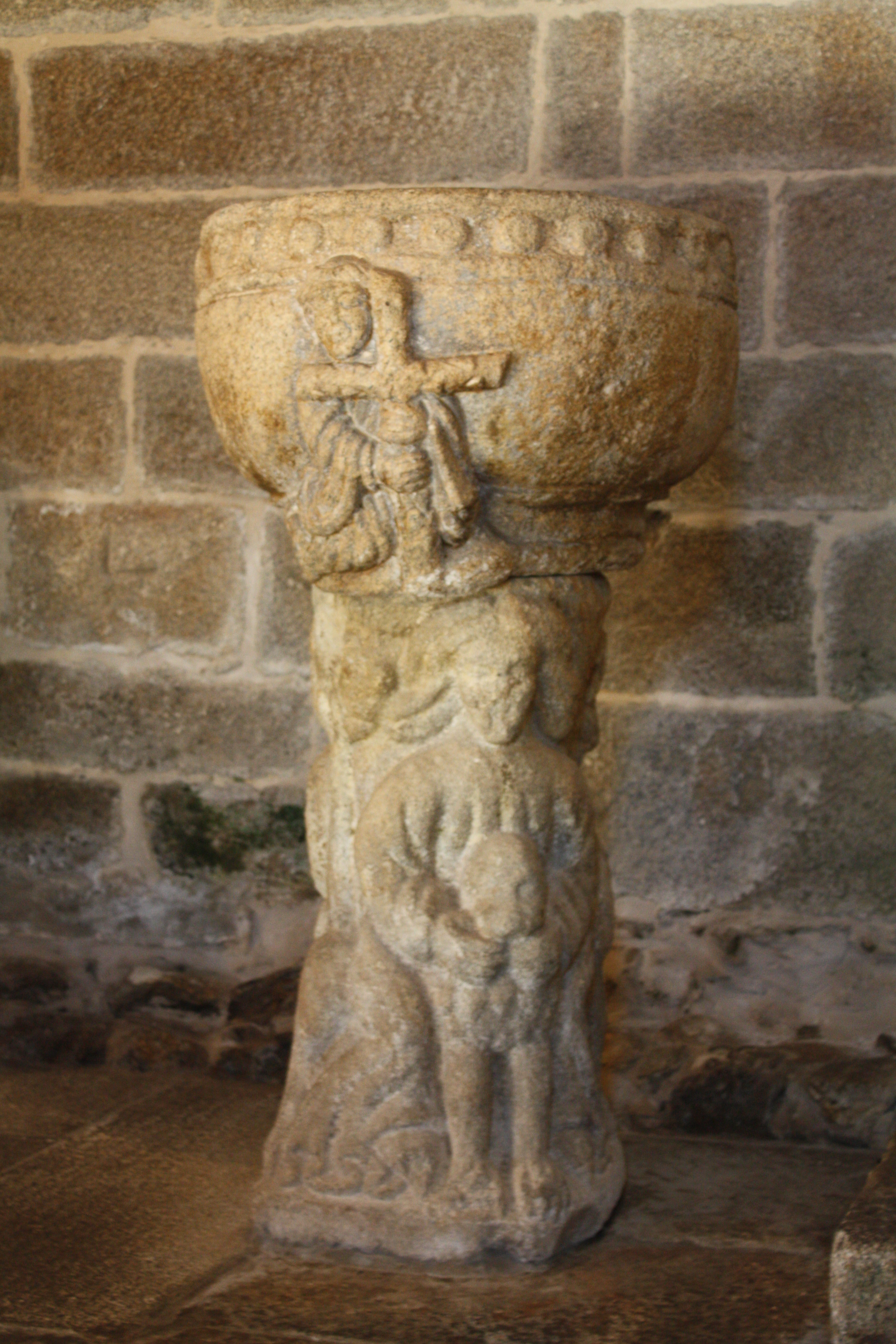 Pía bautismal na igrexa de Santa María a Nova, en Noia (A Coruña)